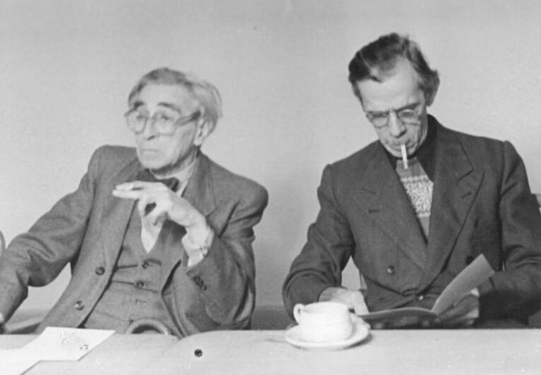 Bernhard Kellermann, Otto Nagel Vorbereitender Ausschuss der Deutschen Akademie der Künste UBz: Bernhard Kellermann u. Prof. Nagel 21.3.50 Abgebildete Personen: Nagel, Otto Prof.: Maler, Präsident der Akademie der Künste (AdK), Nationalpreisträger, Vaterländischer Verdienstorden (VVO) in Gold, DDR (GND 118586300)